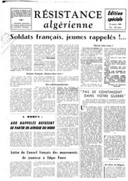 Résistance algérienne no 1 (22-10-1955)